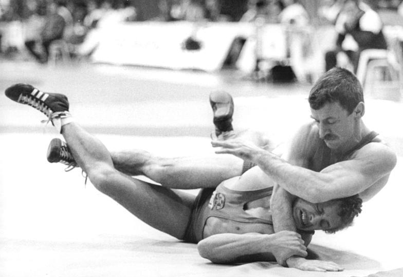 Bernd Bobrien, Olaf Tölle ADN-ZB Kluge 2.2.85-ku Leipzig: DDR-Meisterschaften im Ringen - Freistil In der Klasse bis 57 kg gewann Titelverteidiger Bernd Bobrien vom SC Chemie Halle, oben seinen ersten Kampf gegen Olaf Tölle (ebenfalls SC Chemie Halle) nach Punkten.